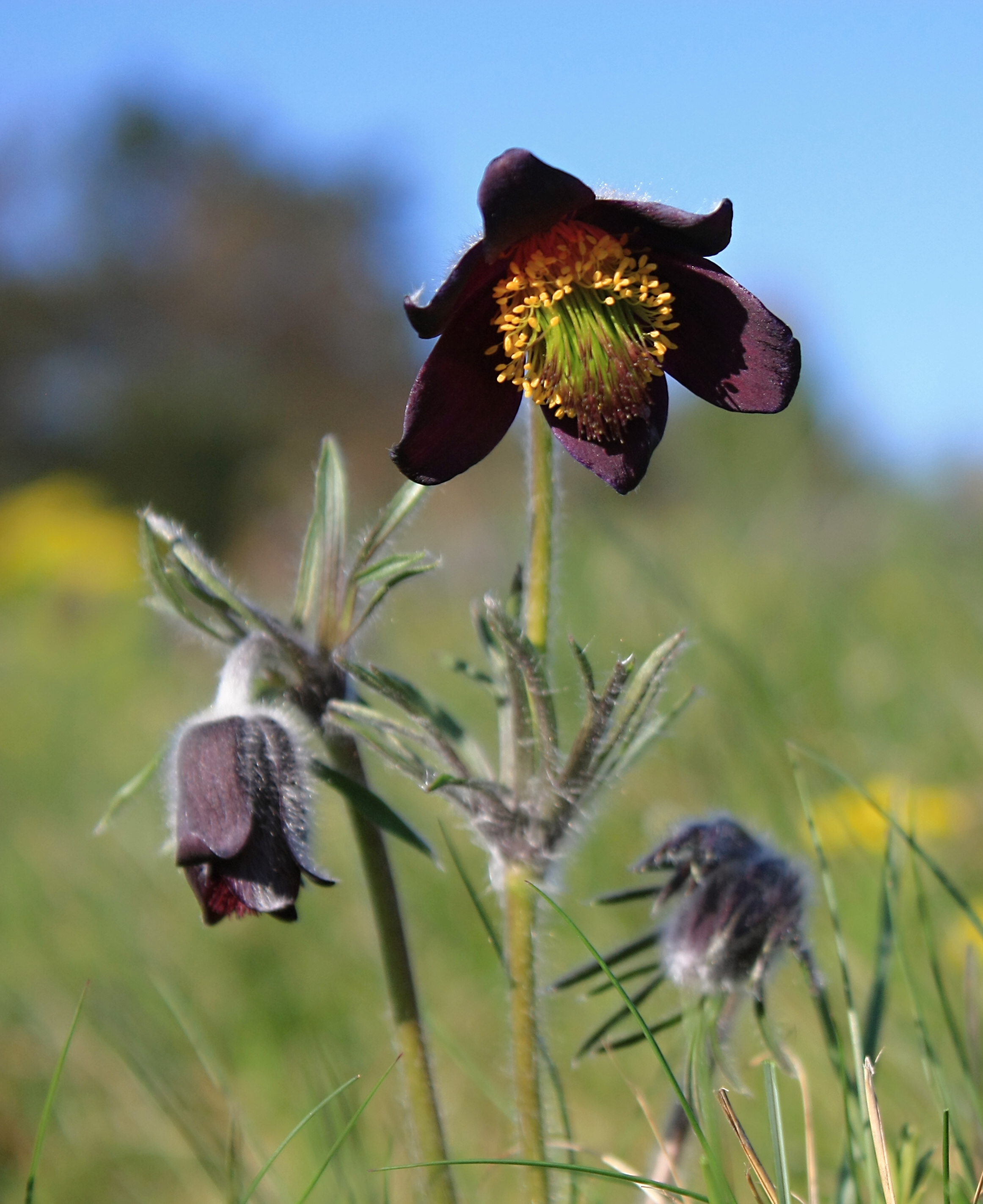 Kvetoucí koniklec luční